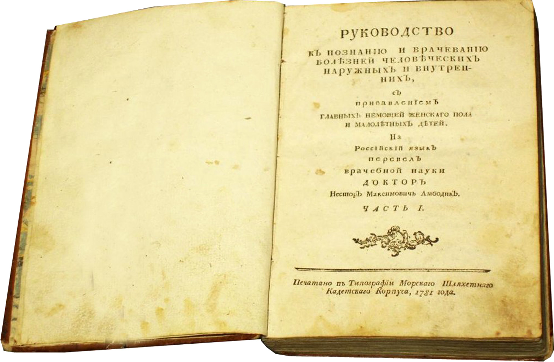 Титульный лист перевода книги И. Штейбера (по переводу на латинский язык и с прибавлениями П. И. Погорецкого), сделанный Нестором Максимовичем Амбодиком "Руководство к познанию и врачеванию болезней человеческих наружных и внутренних, : С прибавлением главных немощей женскаго пола и малолетных детей"